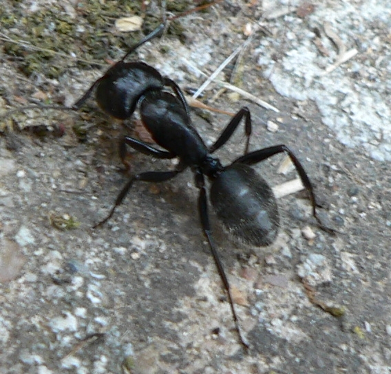 Camponotus vagus ant, Cargèse, Corsica